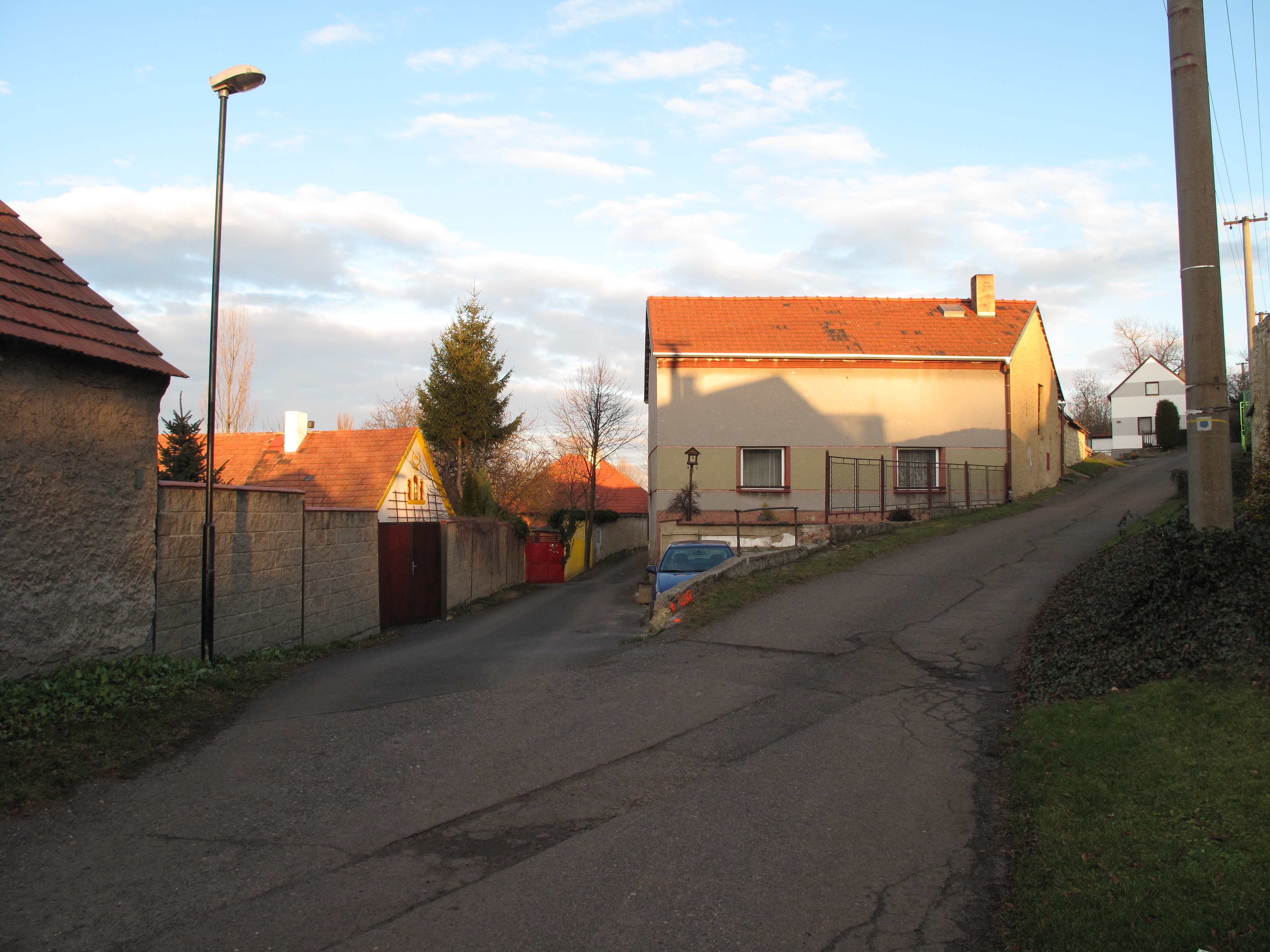 Rozcestí v Levousích. Okres Litoměřice, Česká republika.